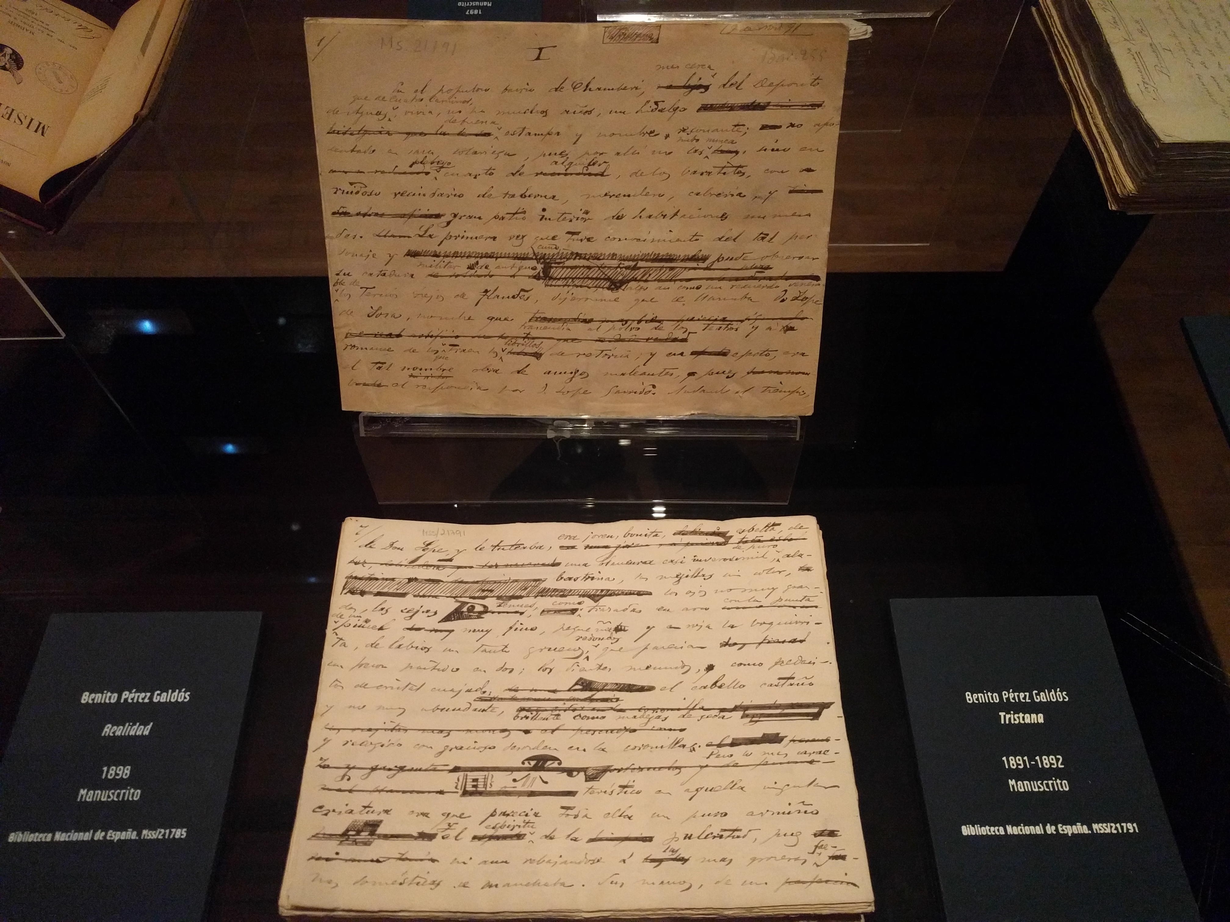 Manuscrito de Tristana (novela) de Benito Pérez Galdós, 1891-1892. Biblioteca Nacional de España.